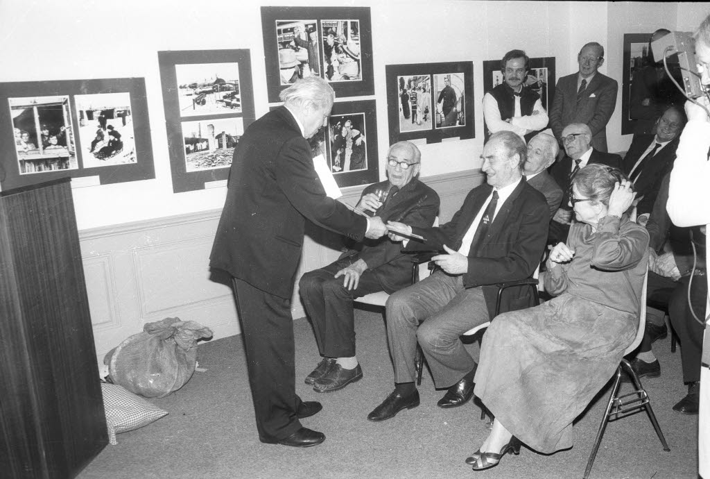 Der ehemalige Chefredakteur der Kieler Volkszeitung Karl Rickers (3.v.l.) erhält Geburtstagsgeschenke. Im Bild u.a. seine Frau, die Journalistin Susanne Materleitner (8.v.l.), Albert Witte, der ehemalige Büroleiter des Oberbürgermeisters (rechts hinter Rickers sitzend), und Oberbürgermeister Karl Heinz Luckhardt (9.v.l.).